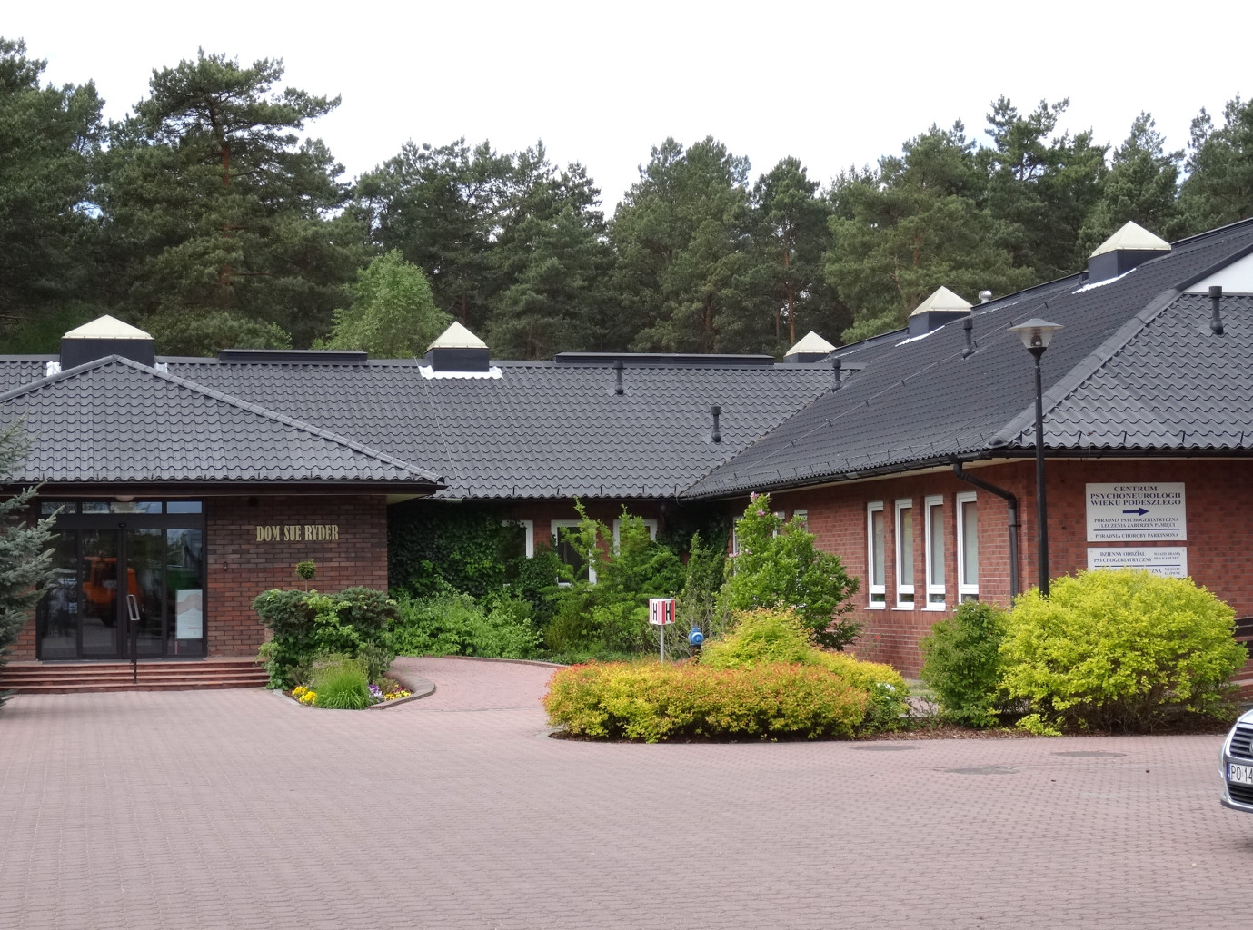 Dom opieki paliatywnej Sue Ryder w Bydgoszczy przy Centrum Onkologii